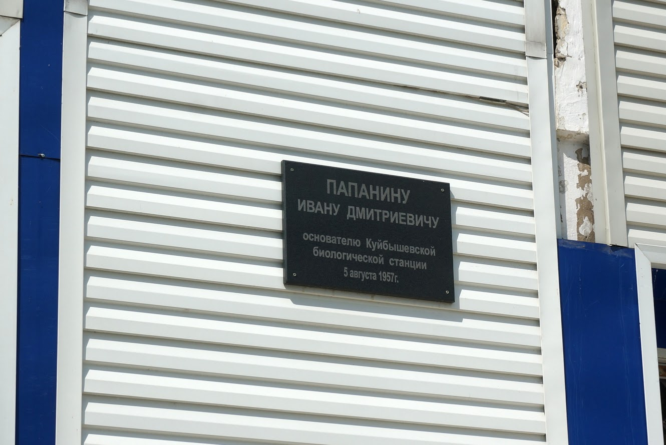 Мемориальная доска основателю Куйбышевской биостанции (ныне Институт экологии Волжского бассейна РАН) Ивану Папанину